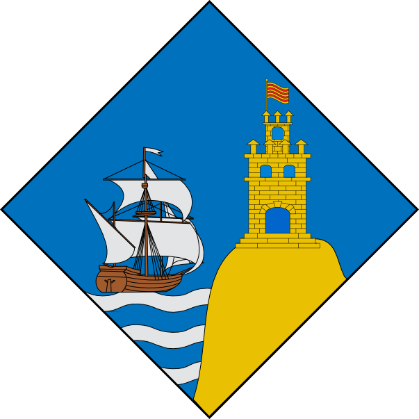 Emblema de l'entitat de població de Fornells